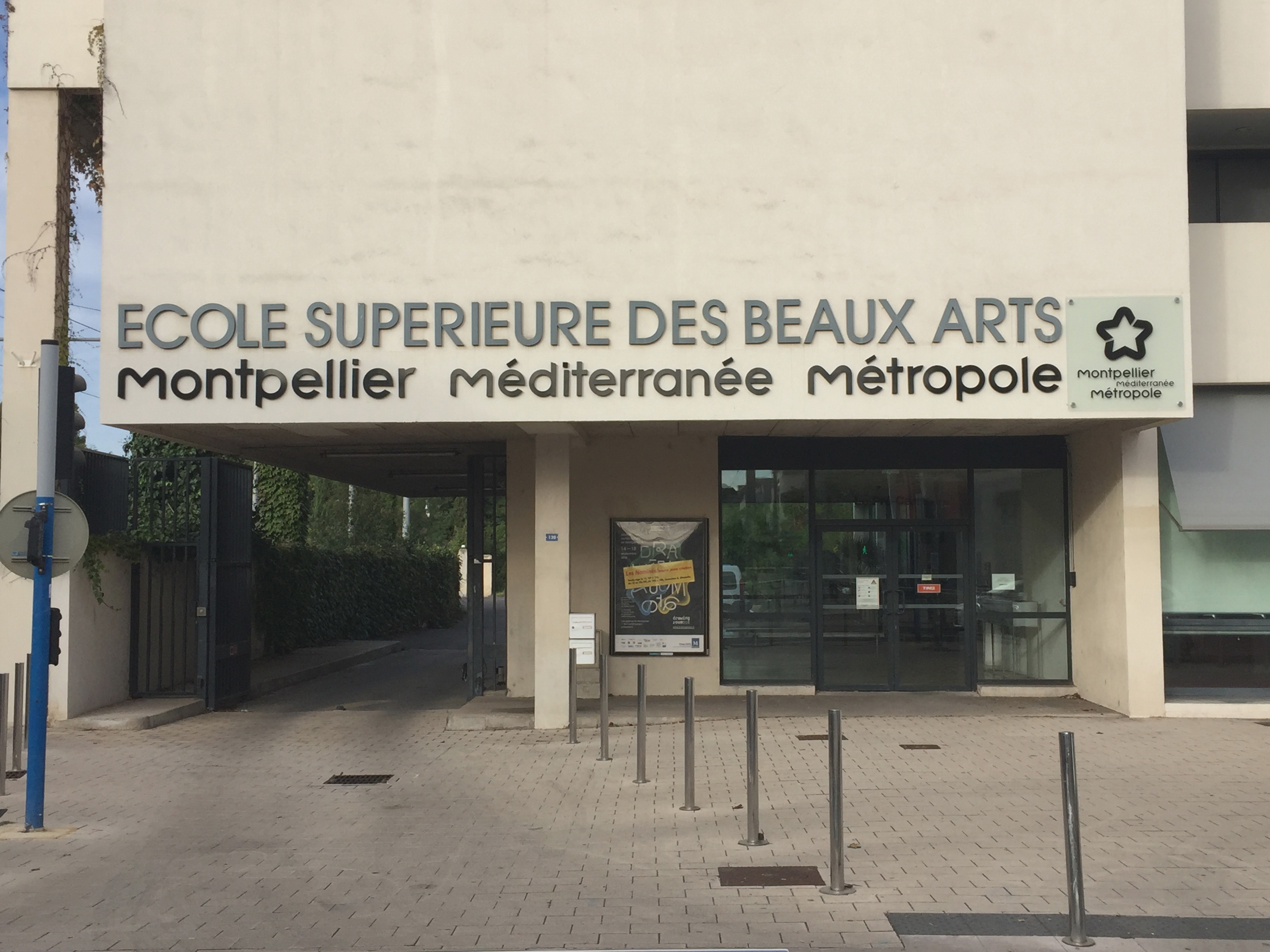 Entrée principale de l'École supérieure des beaux-arts de Montpellier Méditerranée Métropole (ESBAMA) à Montpellier (Hérault).